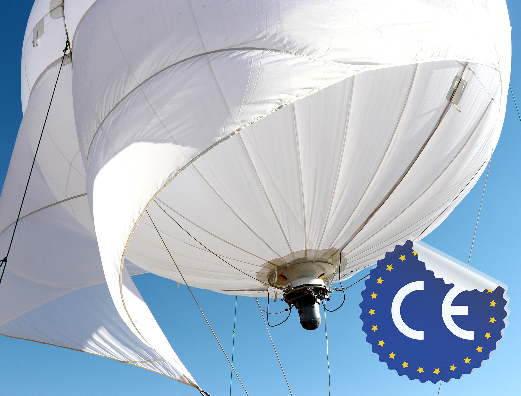 Tecnologia de ponta ALTA Marcação CE